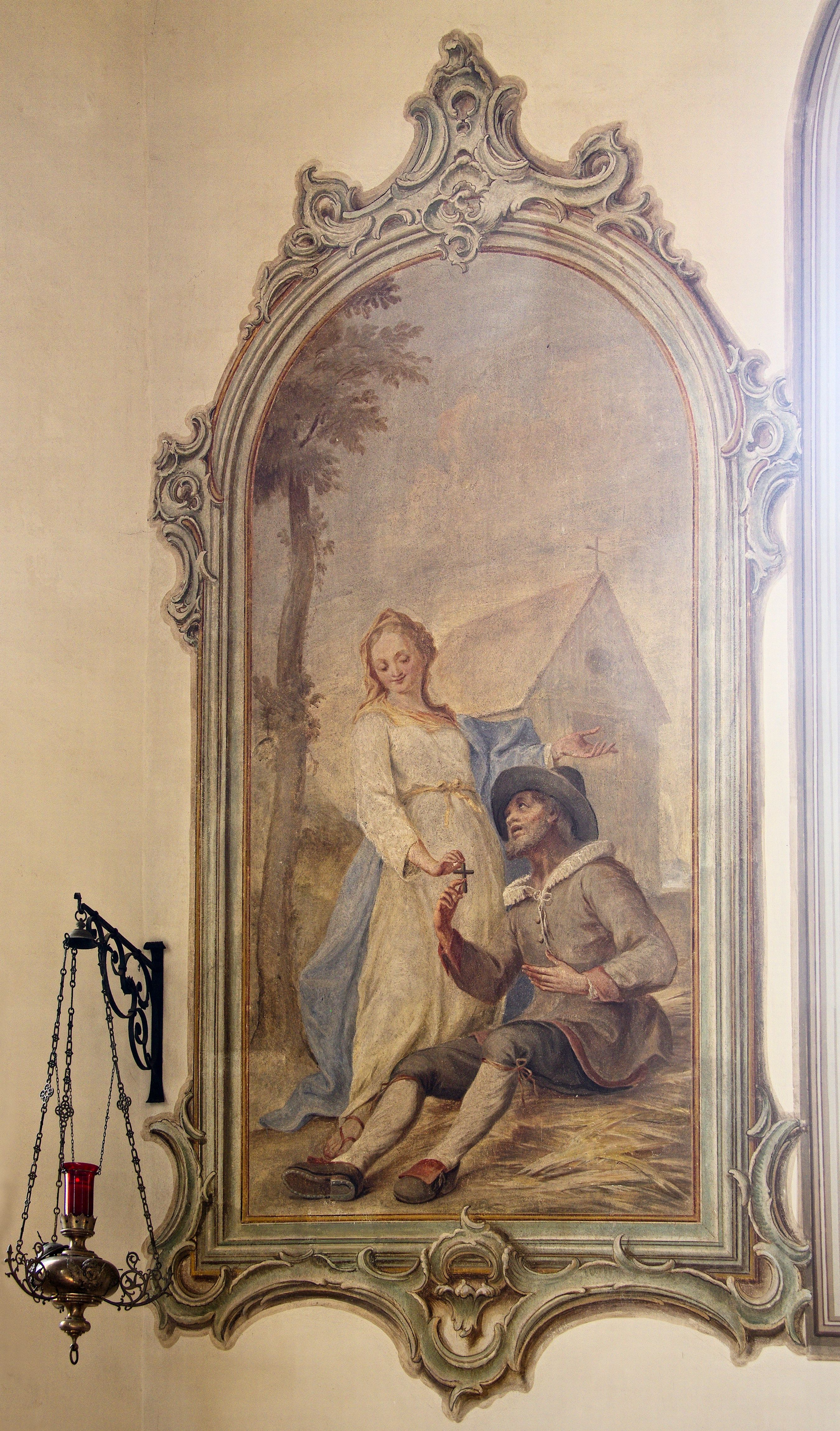 Die katholische Kirche St. Jakobus in Stegen-Eschbach